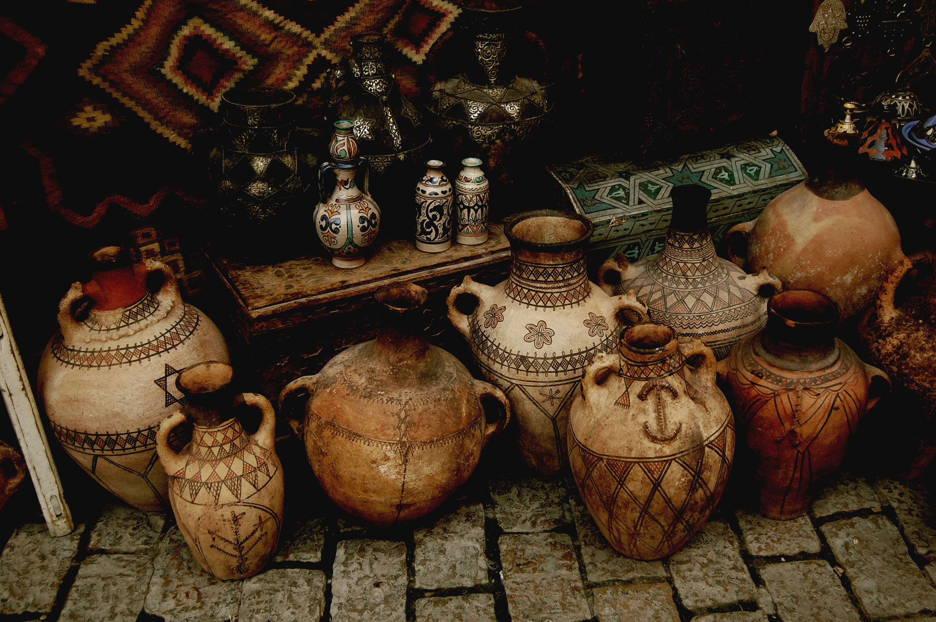 Artesanía bereber del Marruecos, en un puesto de venta en la medina de Fez (Marruecos).